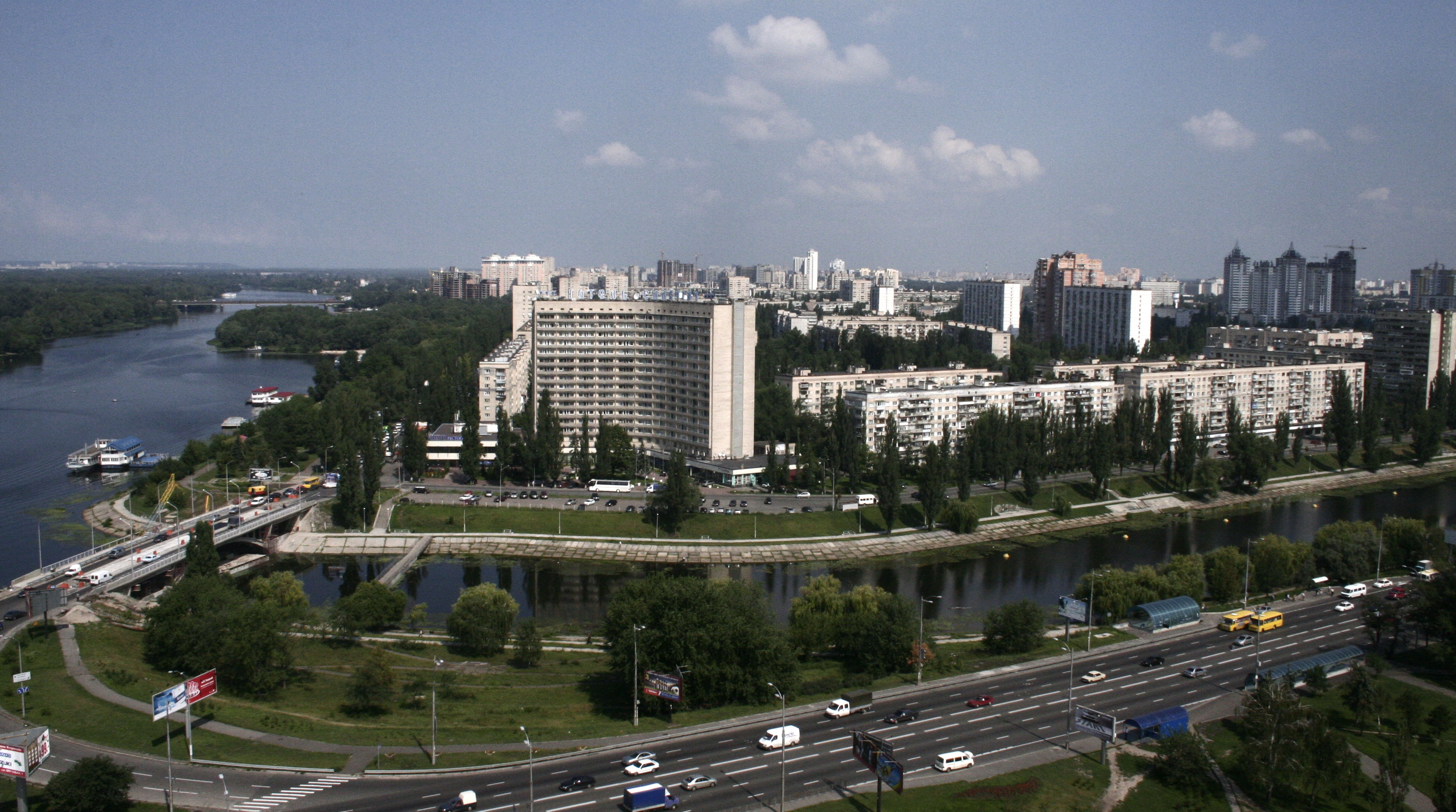 фото 2009 року